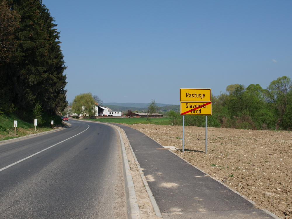 Ulaz u selo Rastušje, Brodsko-posavska županija.